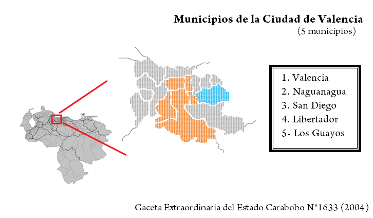 Municipios que componen la Ciudad de Valencia